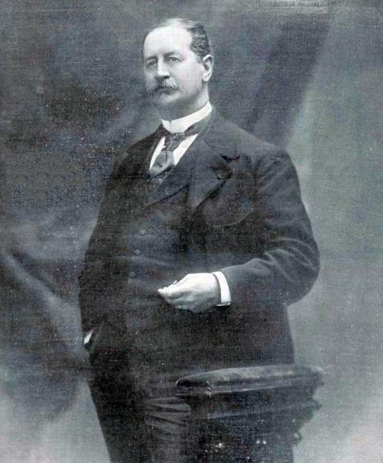 Daniel Mérillon, délégué général aux sports pour les concours sportifs de l'exposition universelle de 1900 (qui présida à la composition du programme des épreuves de chaque sport).